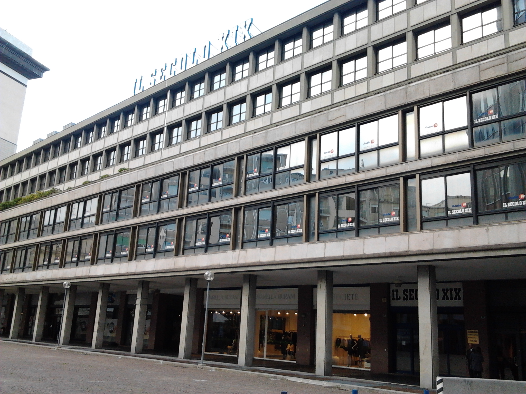 La sede del quotidiano genovese Il Secolo XIX e di Radio 19 in Piazza Piccapietra, 21 a Genova, sede del quotidiano a partire dal 1999